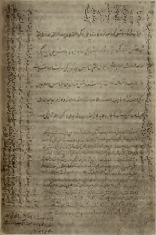 Kəmalüddövlə məktubları